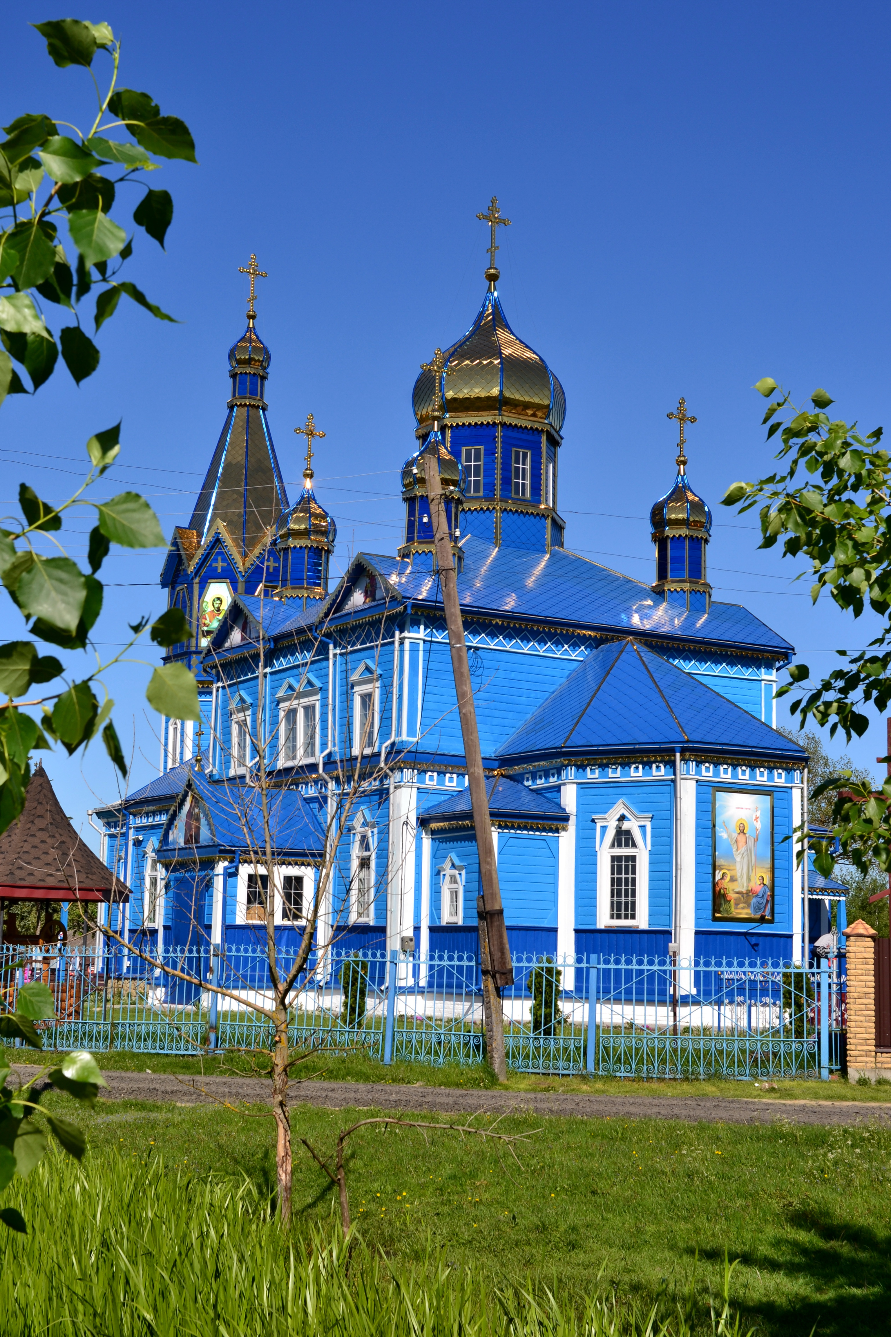 Покровська церква (дер.) (1900 рік) - вигляд зі сходу - Дубечне (вул. Садова, 6Б) Старовижівський район Волинська область Україна